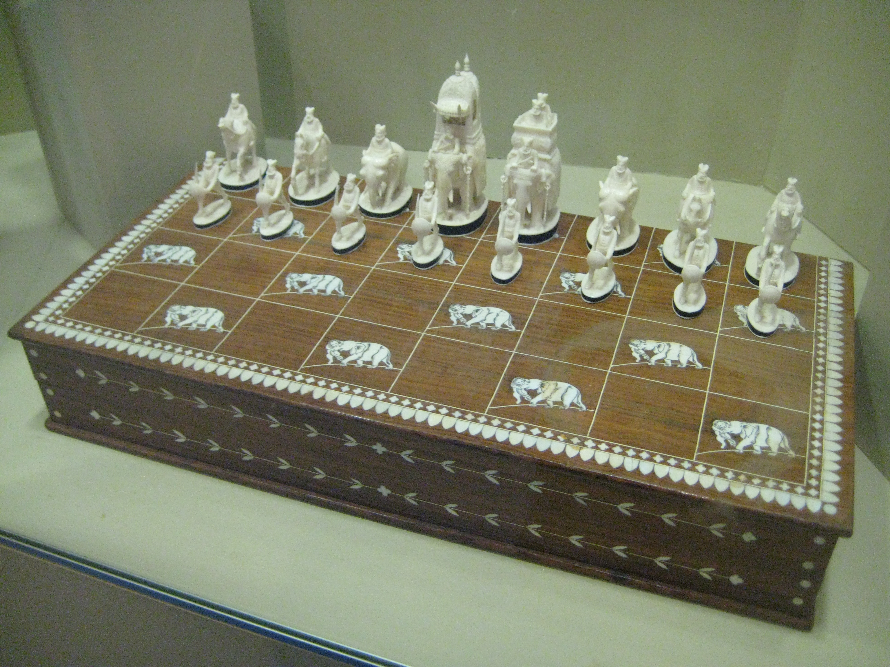 Шахматы. Государственный центральный музей современной истории России